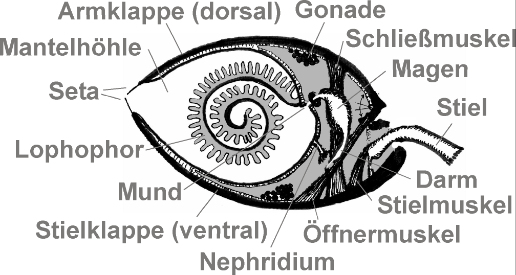 Prinzipdarstellung eines Vertreters der Rhynchonelliformea (eines Brachiopoden oder Armfüßers)